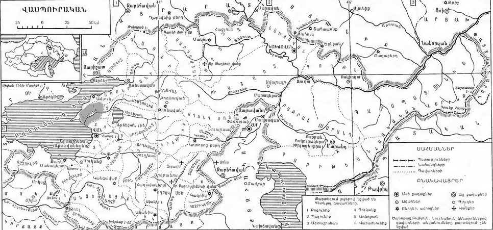 Վասպուրական